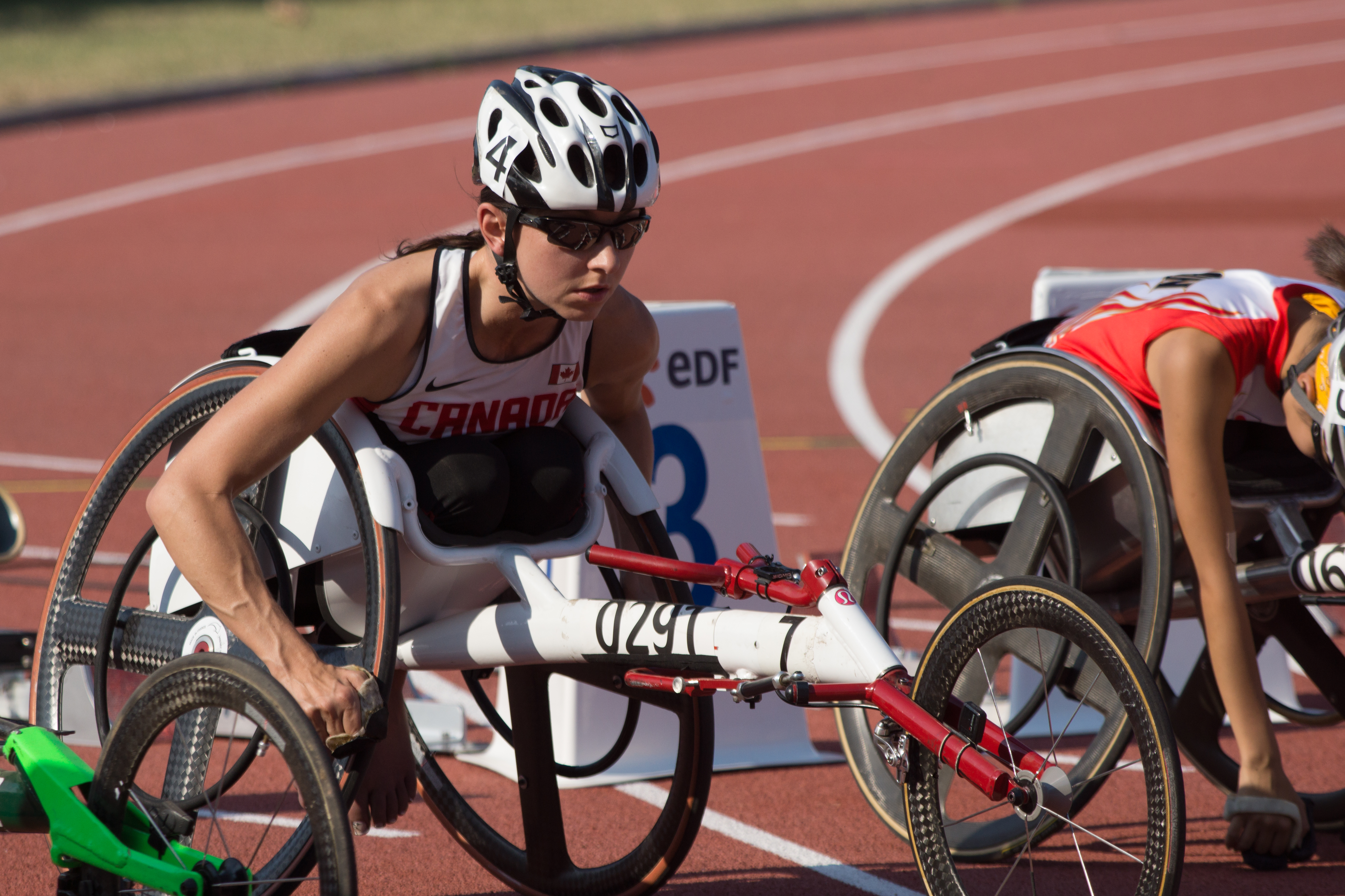 Championnats du monde d'athlétisme handisport 2013. 100 mètres féminin T52.